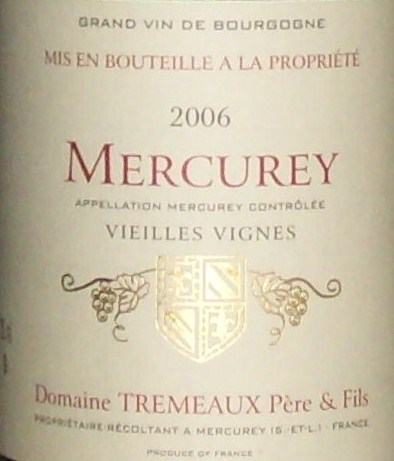 Etiquette de Mercurey